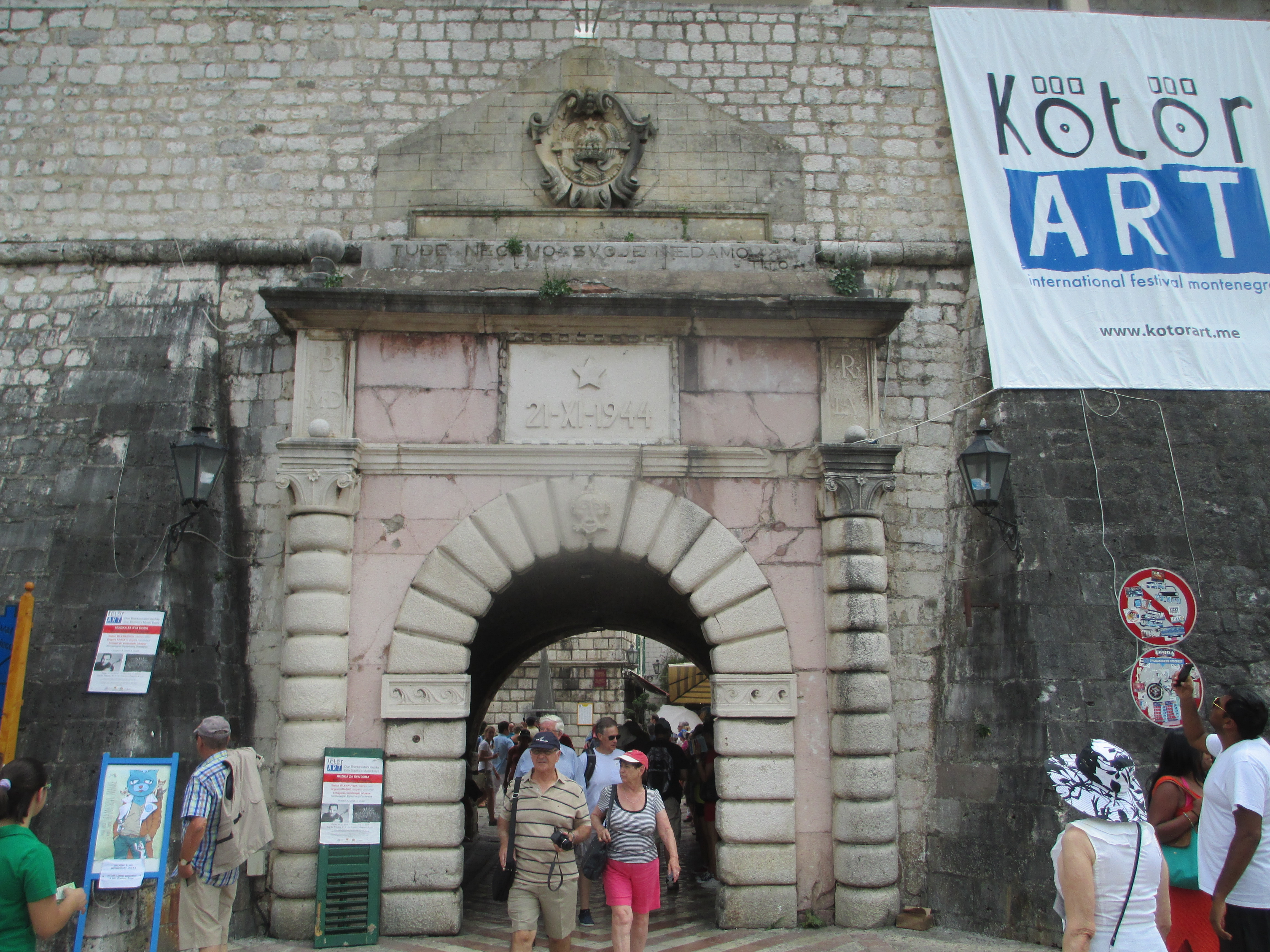 שער הים בקוטור